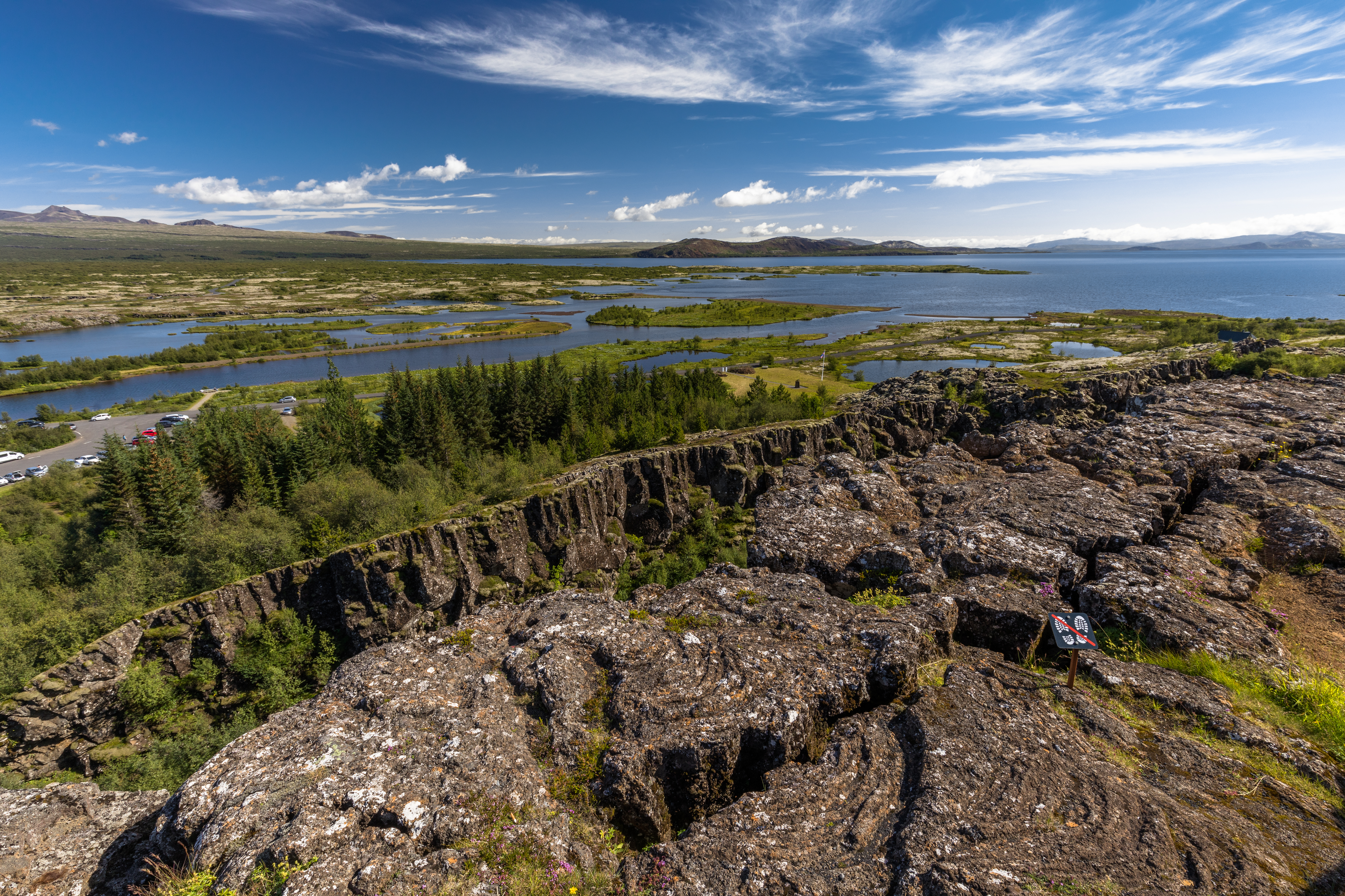 Island_2017_330-0.jpg